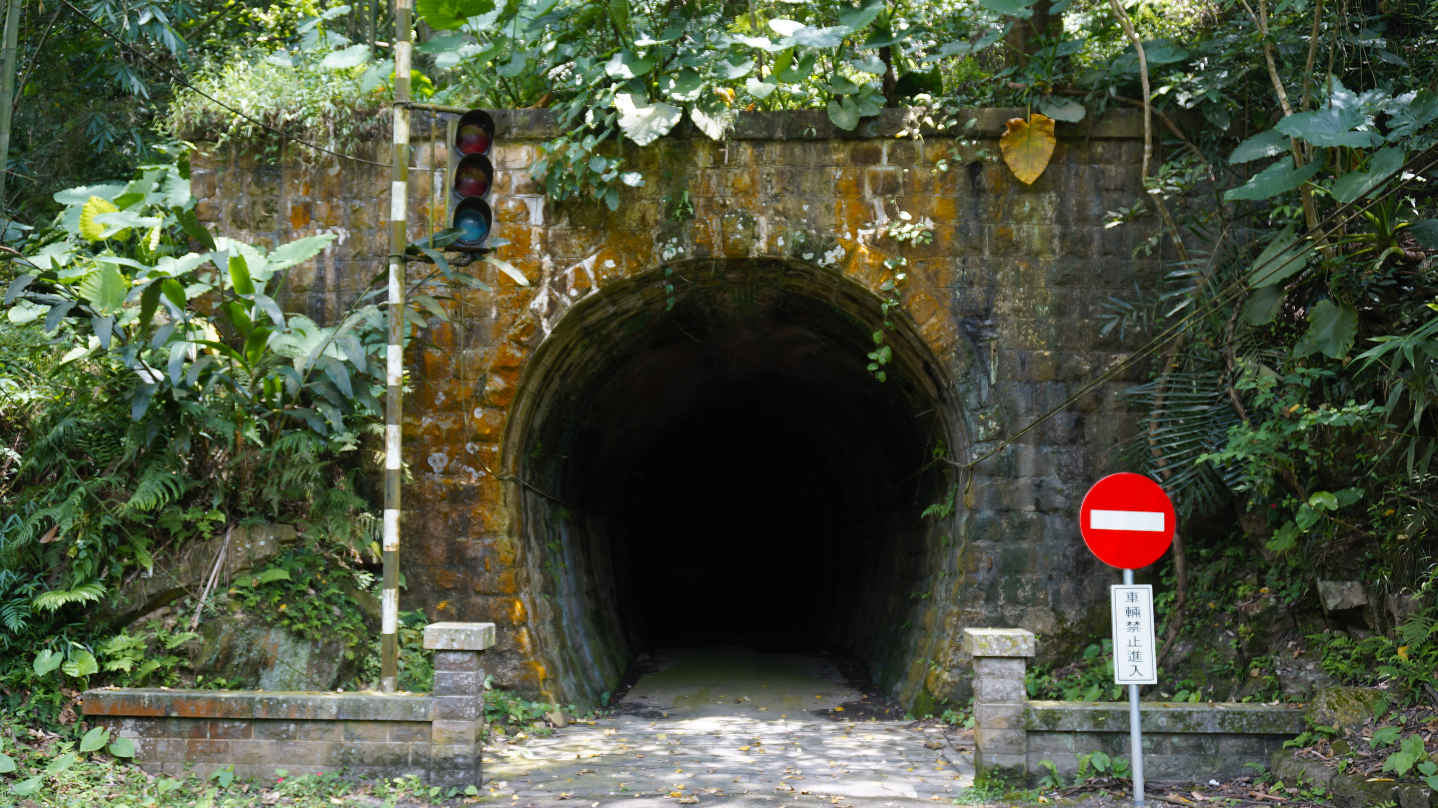 中文（台灣）: 大觀古隧道